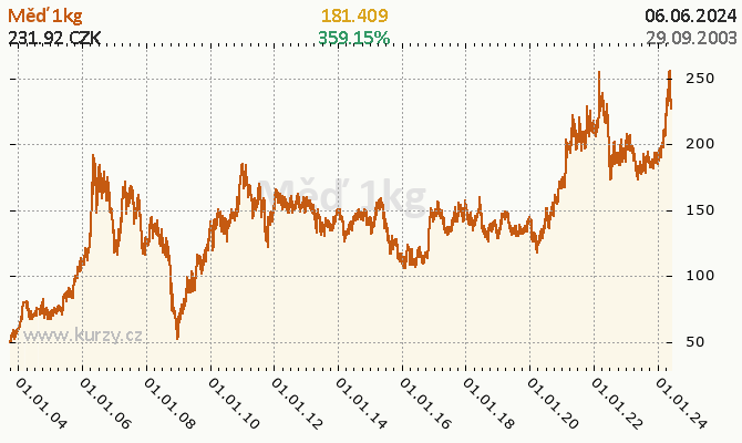 Kakao - Cena komodity.